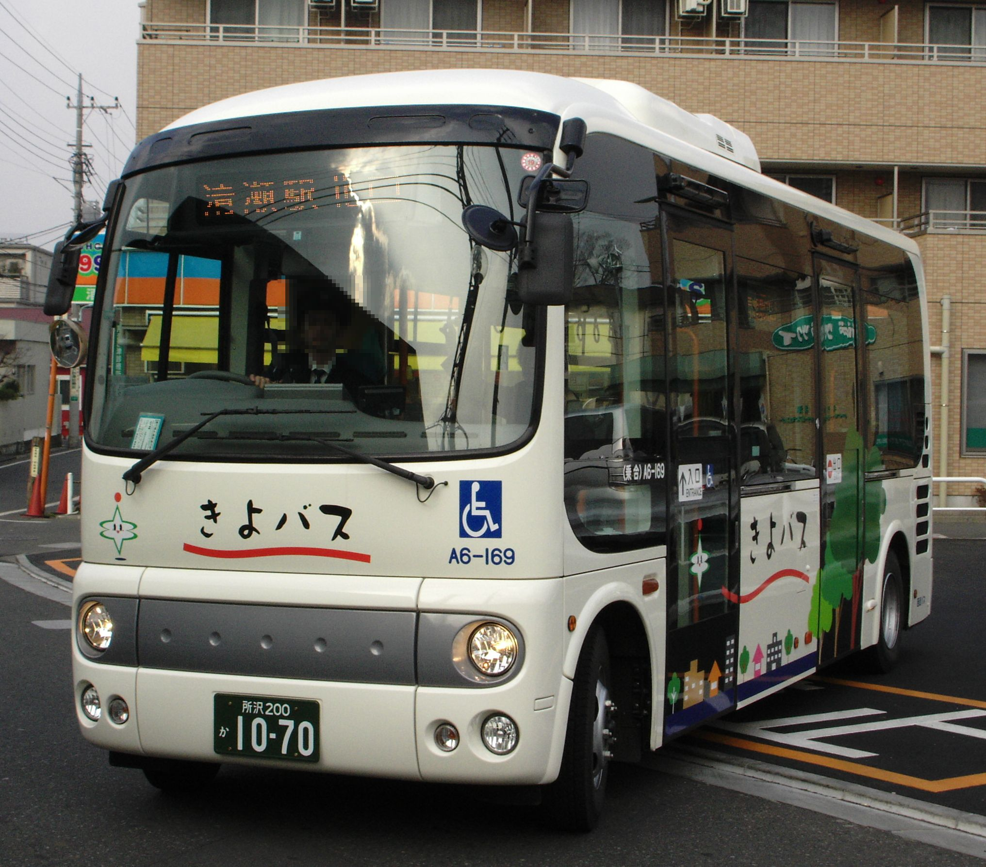 清瀬市コミュニティバス「きよバス」